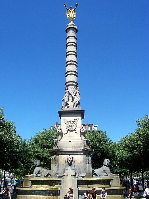 Parigi - Fontaine du Palmier